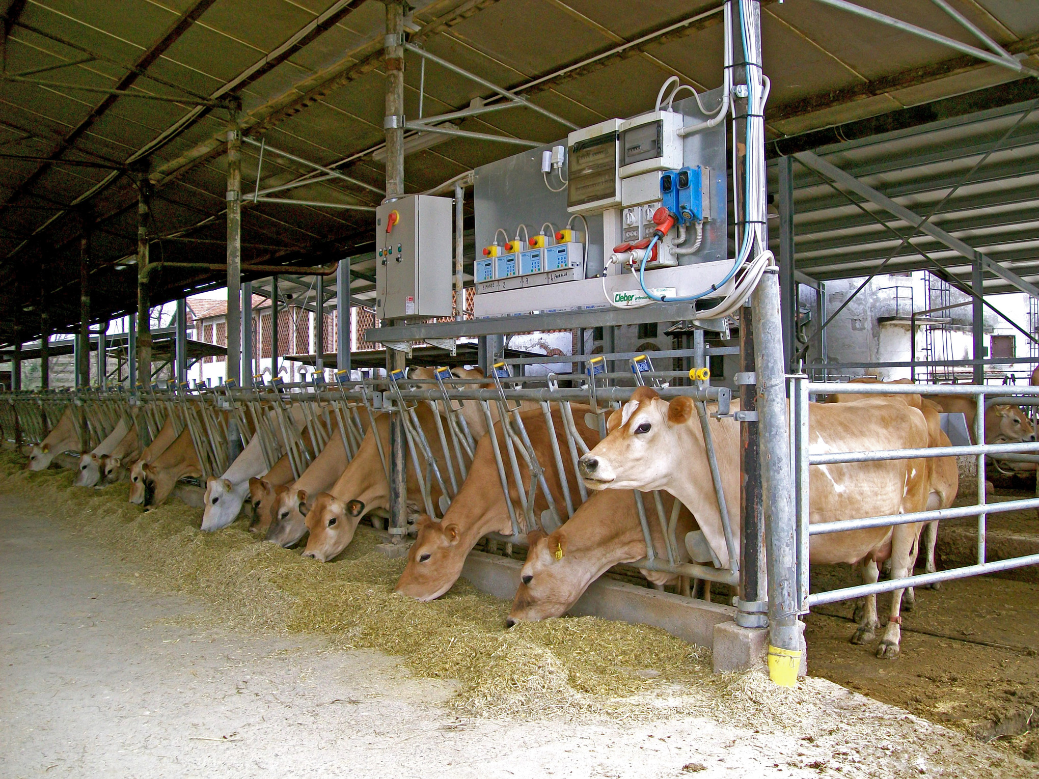 Arese, le stalle dell'azienda agricola della cascina Cinci.